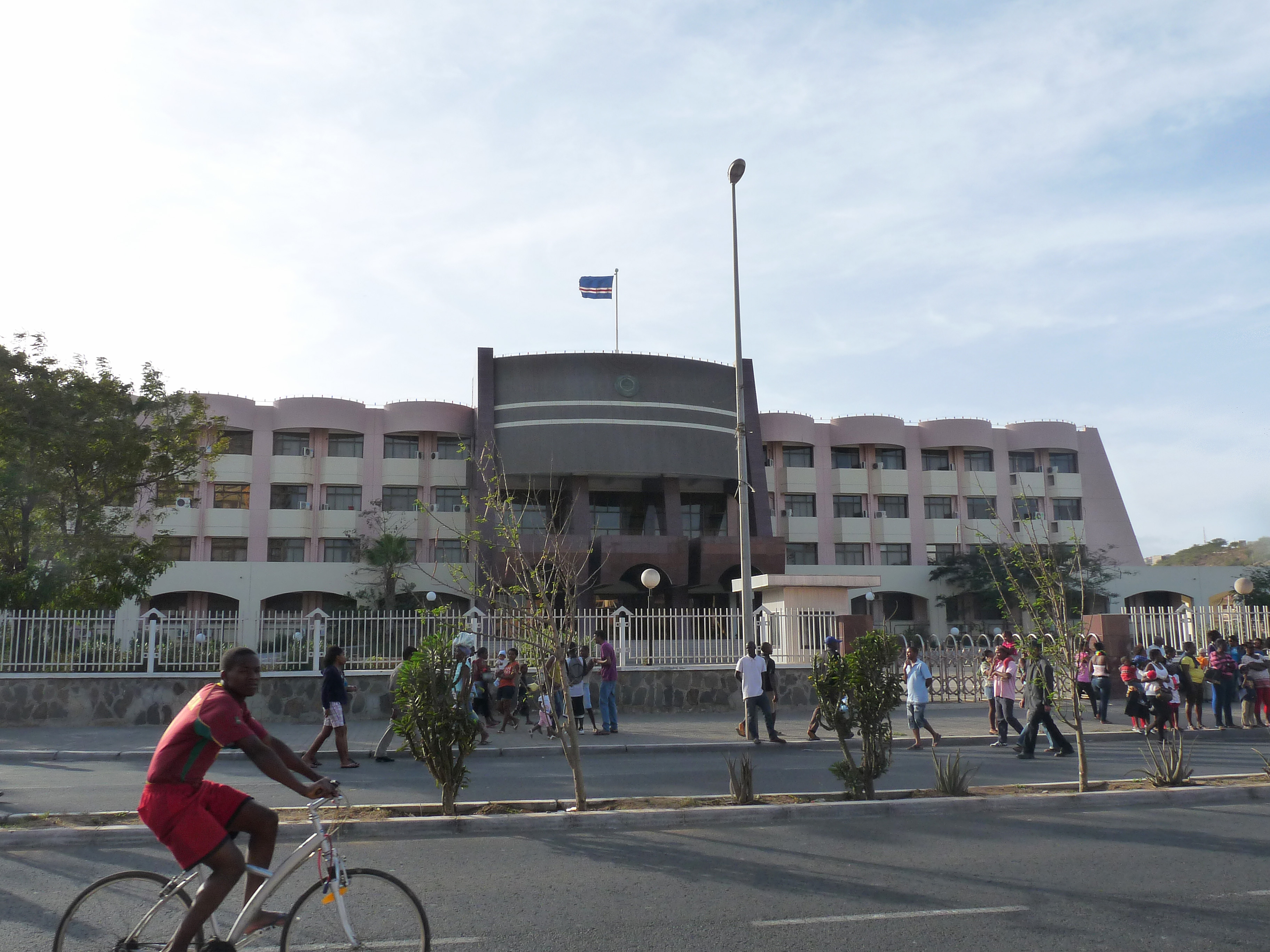 Praia : Assemblée nationale du Cap-Vert (le jour de Carnaval)